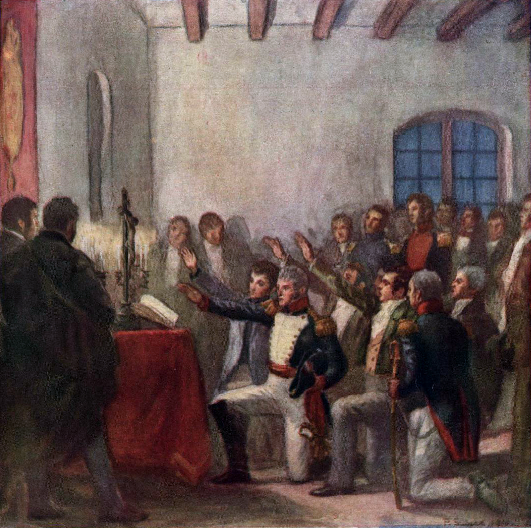 "Juramento de la Primera Junta Gubernativa Argentina (25 de mayo de 1810)." Por el pintor chileno Pedro Subercaseaux.